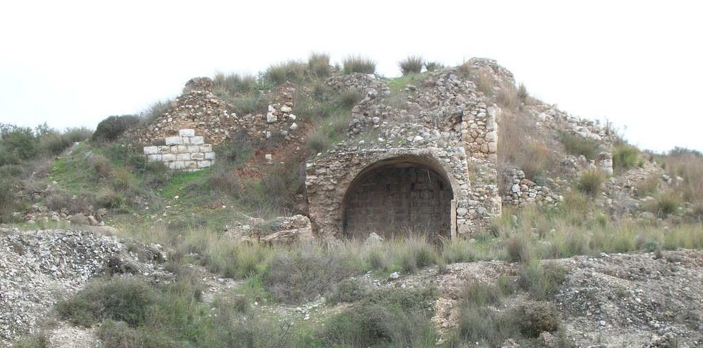 נחל ענבה - כבשן סיד